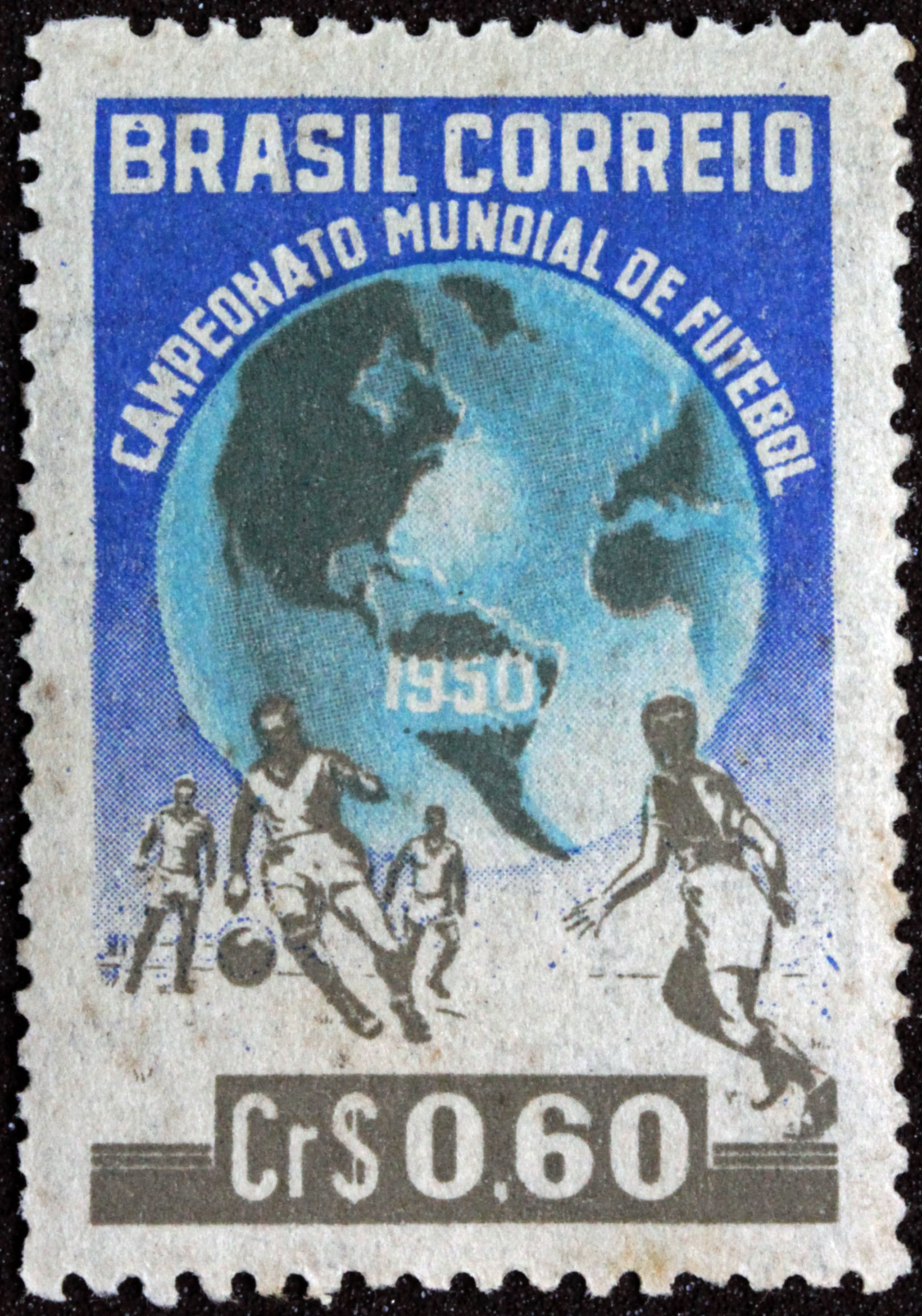 Selo Comemorativo do Campeonato Mundial de Futebol de 1950 (Copa do Mundo de 50).